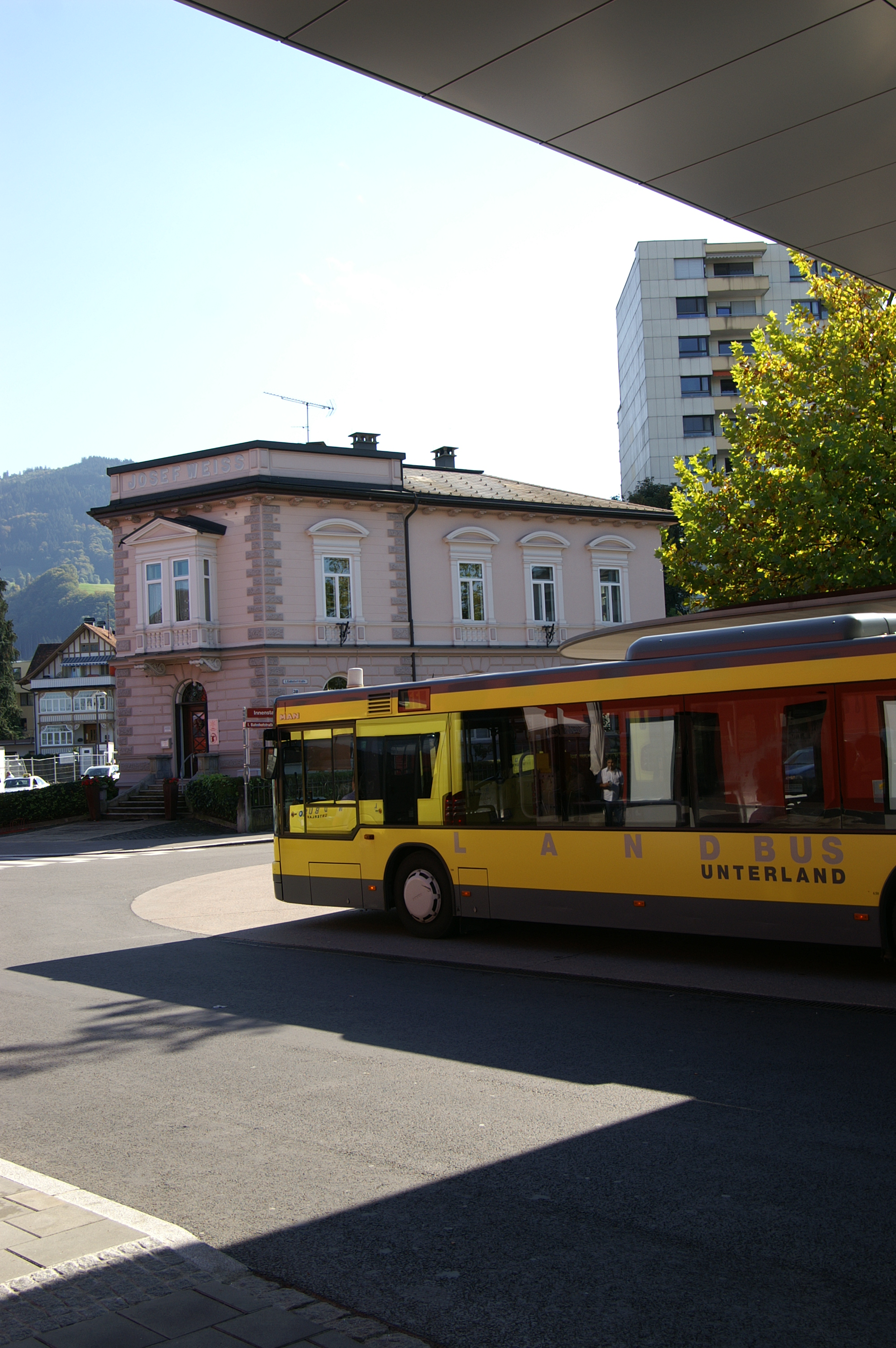 Hauptbahnhof (Unterführung) Dornbirn, in Vorarlberg